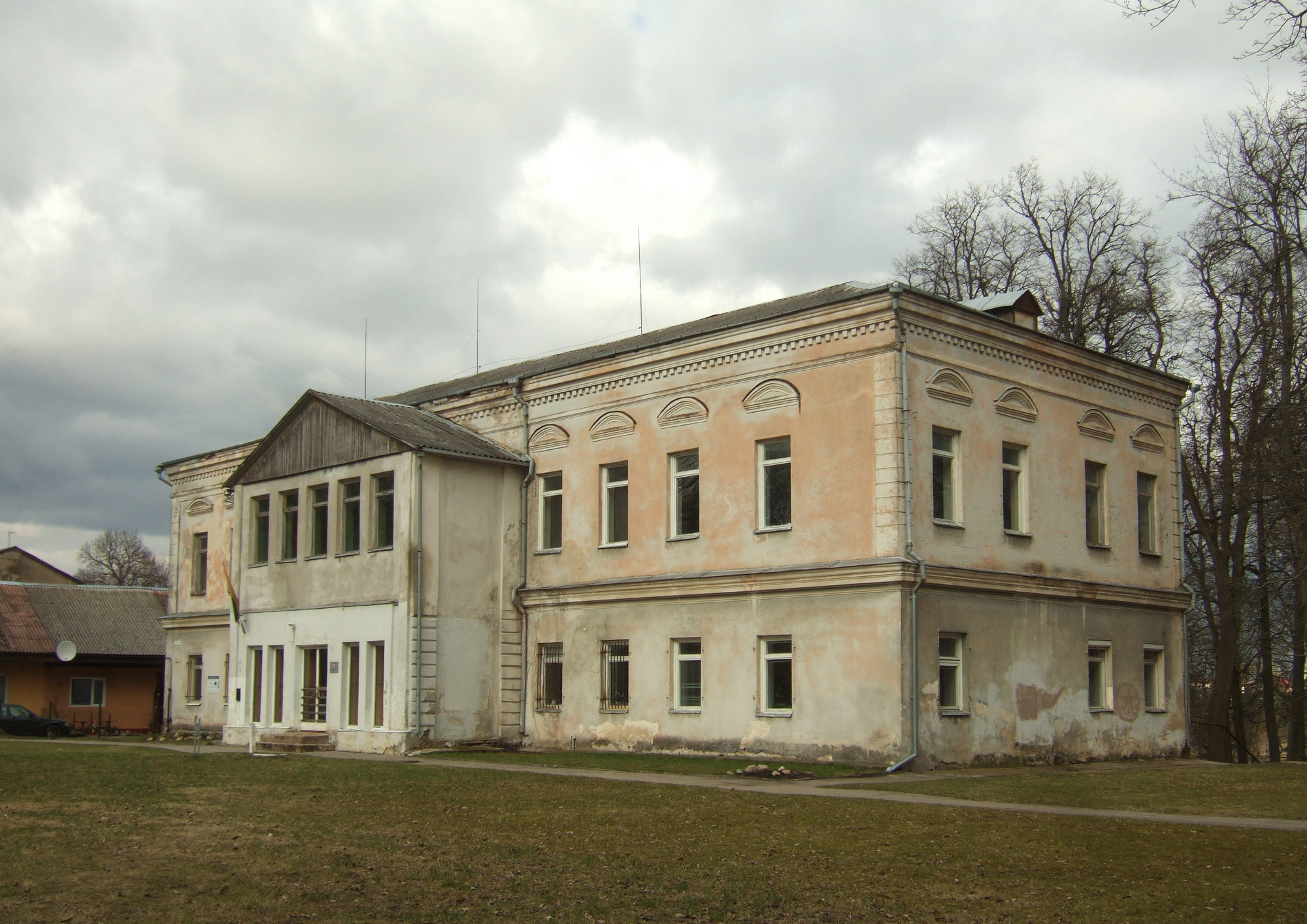 Buivydiškių dvaro rūmų priekinis fasadas